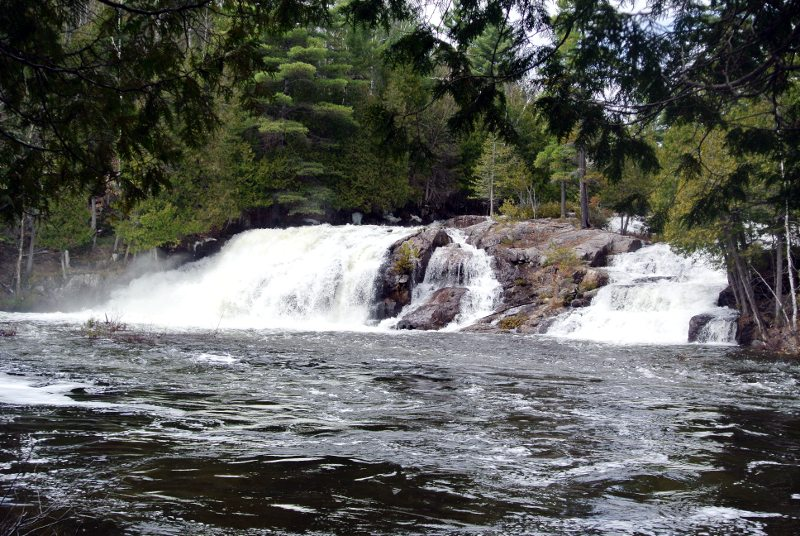 Située sur la rivière Jean-Venne près du lac Chantelle